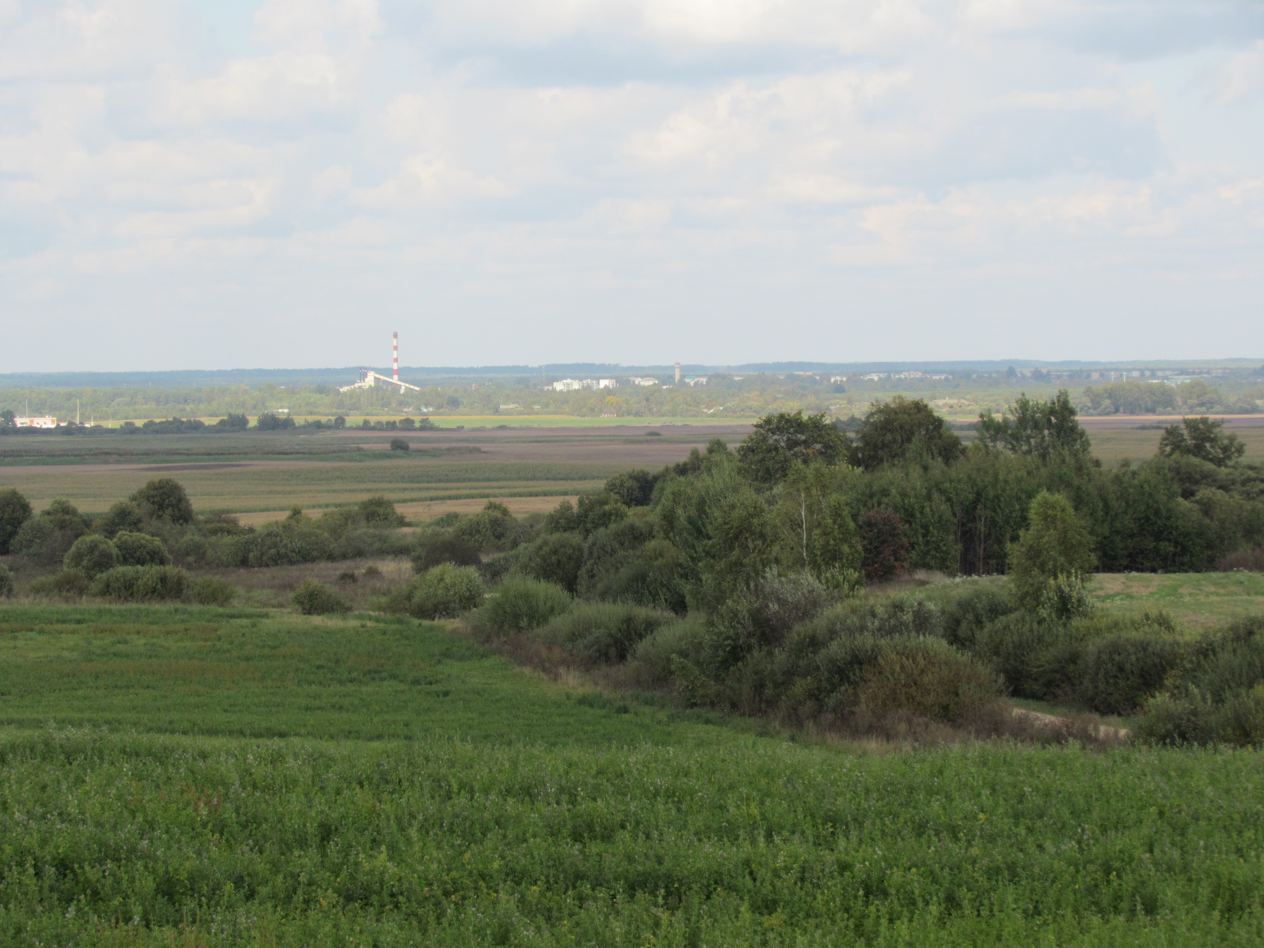 Беларуская (тарашкевіца): Вёска Карабішчы